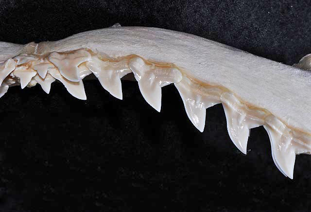 Sphyrna zygaena